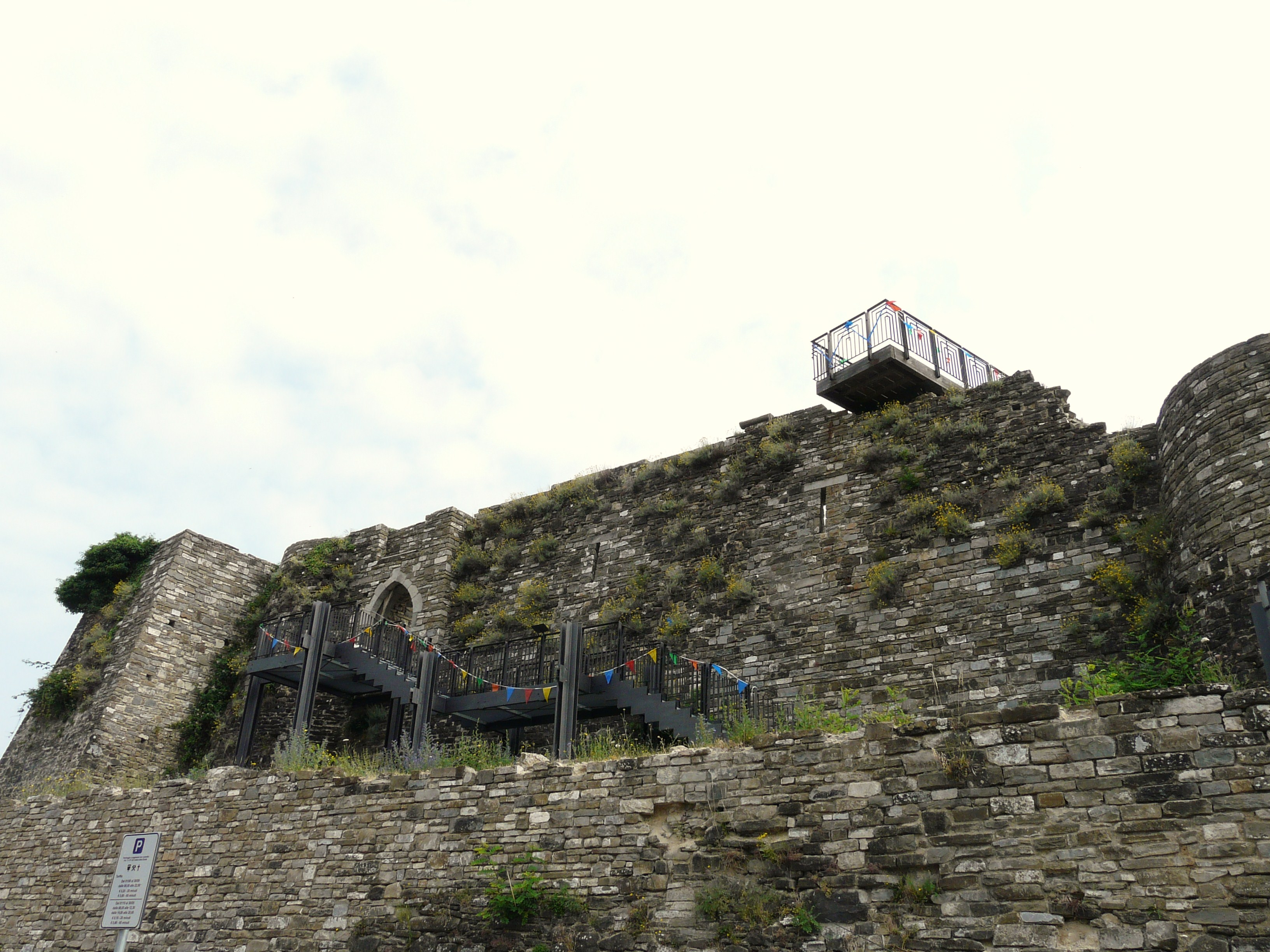 Ruderi del castello di Berceto, Emilia Romagna, Italia